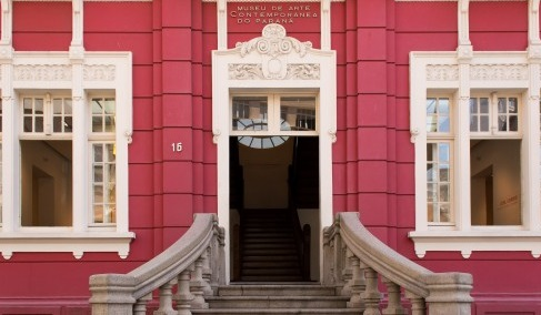 Museu de Arte Contemporânea do Paraná (MAC)